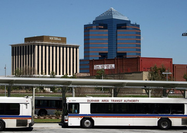 data